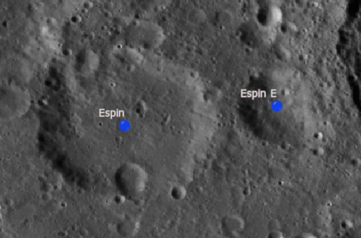 Crater lunar Espin. Cráteres satélite. (Imagen LROC)